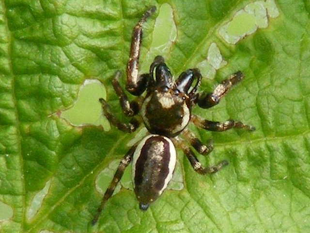 Eris militaris : Photographié dans la région montréalaise le 26 août 2010, sur Fujifilm FinePix S700.